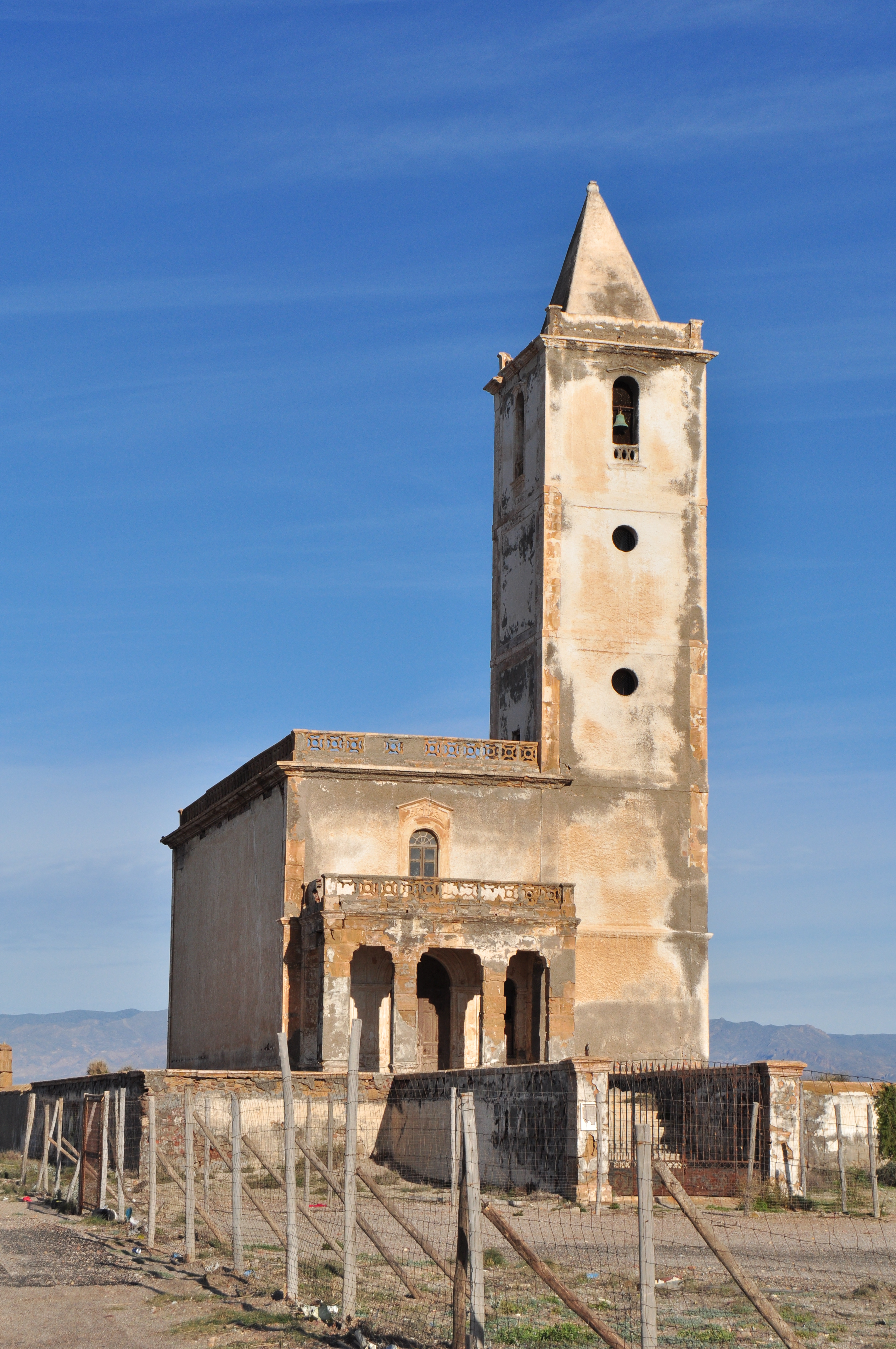 La Almadraba de Monteleva - 001